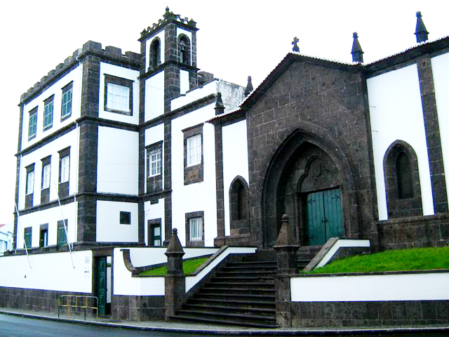 Front façade of the Church and Convent of Santo André, Vila Franca do Campo, São Miguel (Azores), Portugal